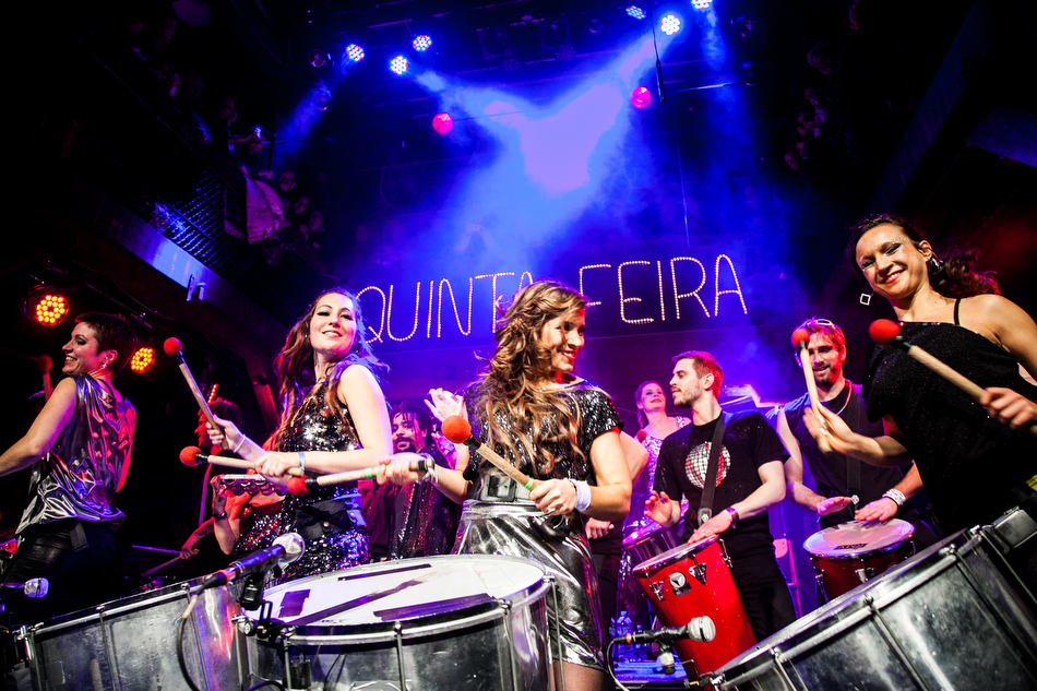 Quinta Feira Konzert 2014